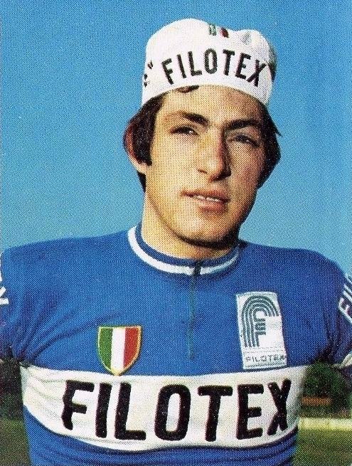 CAMPIONI dello SPORT 1973/74-Figurina n.164- F.MOSER -CICLISMO